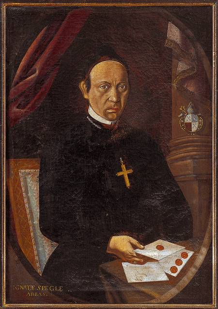 Iganz Speckle letzter Reichsabt von St. Peter auf dem Schwarzwald